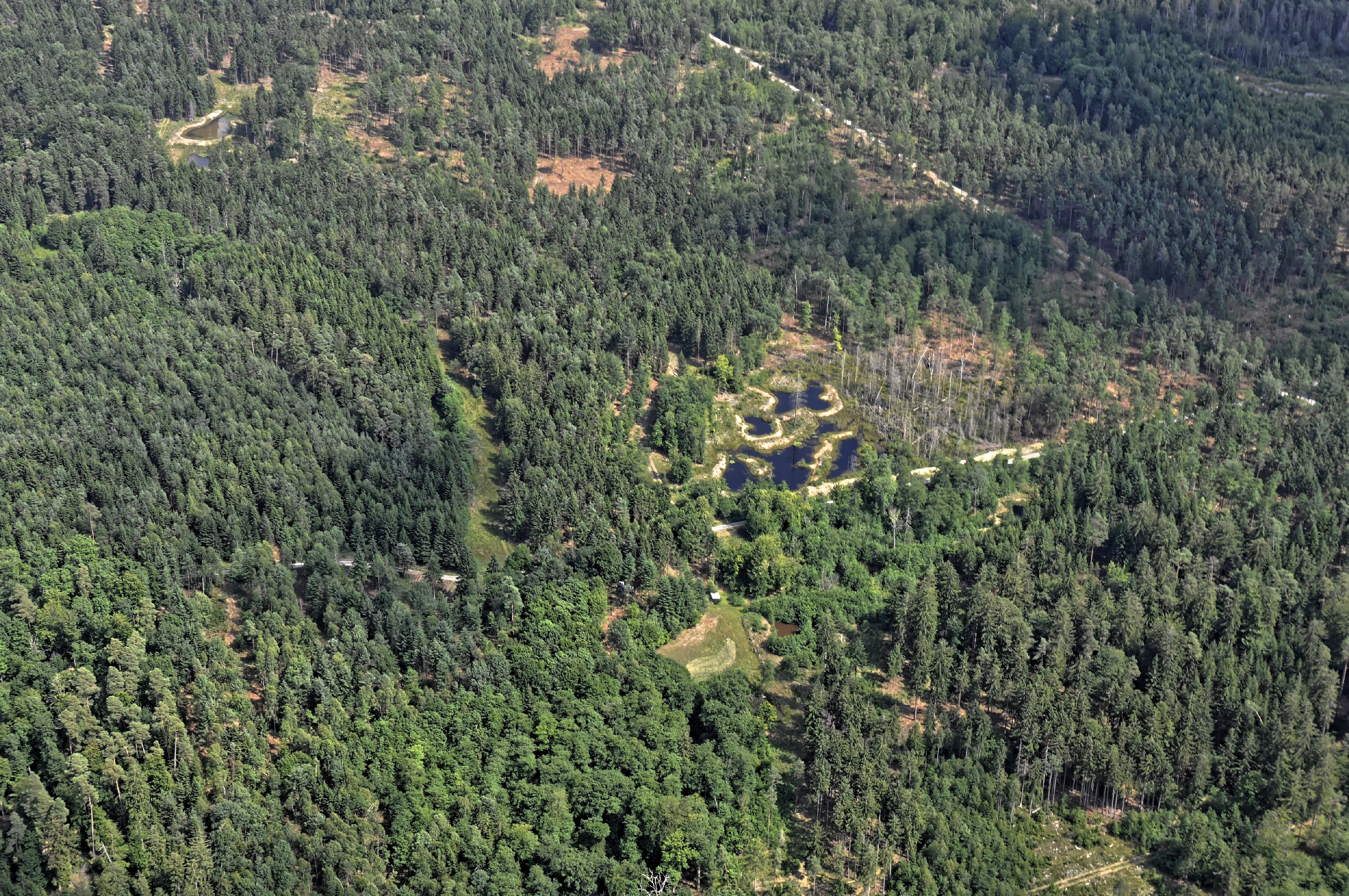 Bilder vom Flug Nordholz-Hammelburg 2015: Tümpel im Feuerbachmoor im Neuwirtshauser Forst zwischen Untergeiersnest im Norden und Neuwirtshaus im Süden.